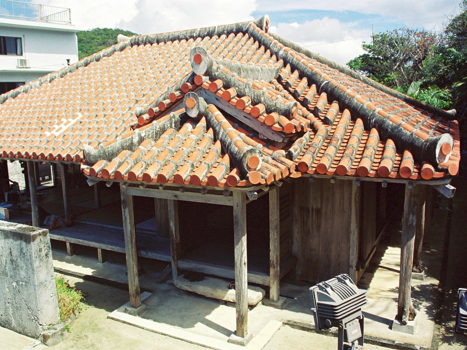 沖縄県座間味村の慶留間島にある「高良家住宅」（国の重要文化財）。 Photo by "Si-take." & uploaded it to Wikipedia(JA). Category:沖縄県の画像Category:重要文化財の画像